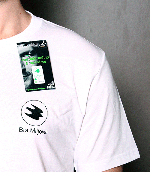 Exempel på textil produkt märkt med Naturskyddsföreningens miljömärkning Bra Miljöval